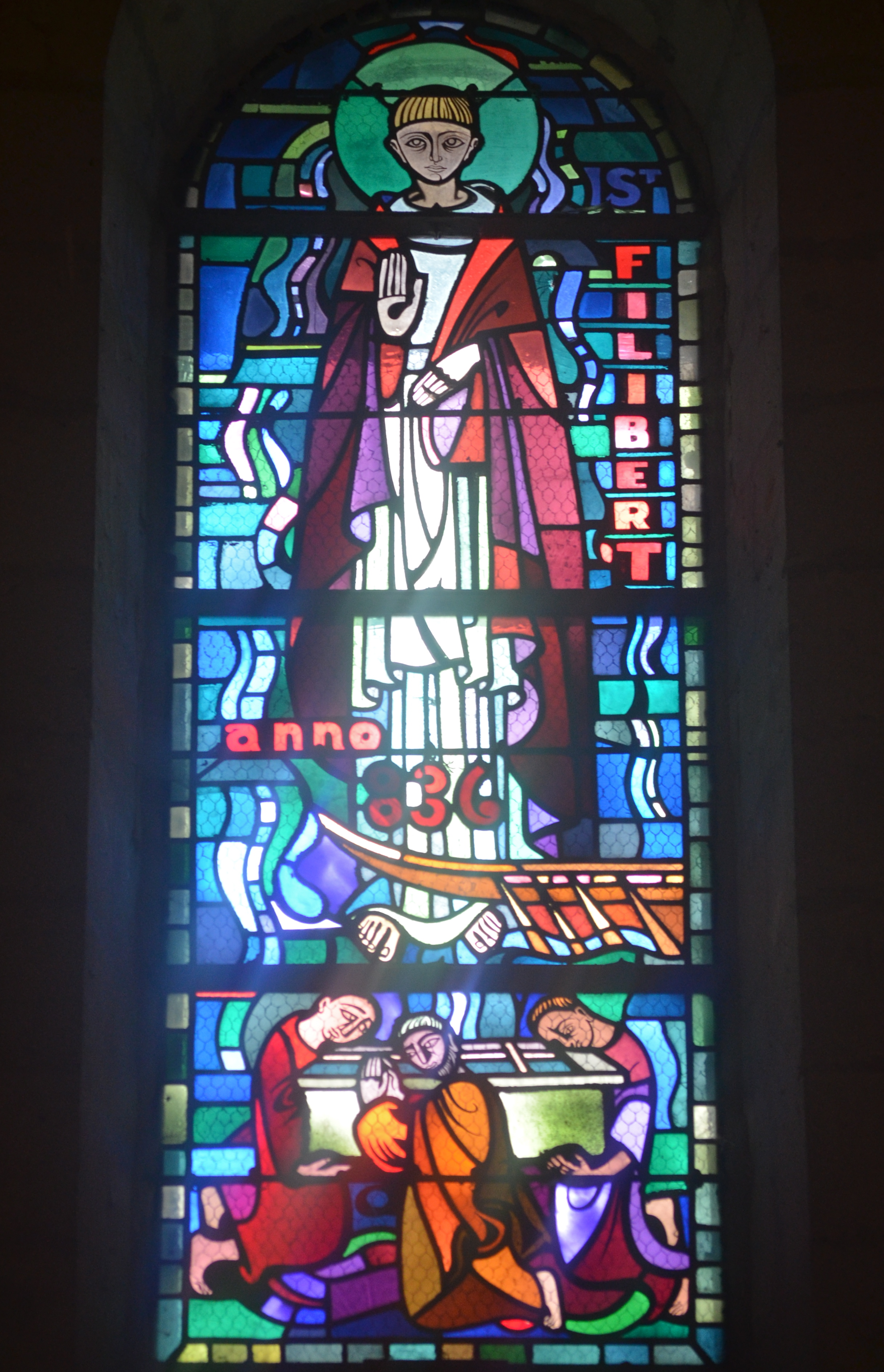 Abbatiale de Saint-Philbert-de-Grand-Lieu (Loire-Atlantique)